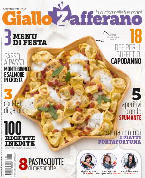 Copertina della rivista Giallo Zafferano gennaio 2018, Arnoldo Mondadori Editore.